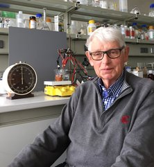 Prof. Dr. Walter Jansen im Labor der EUF